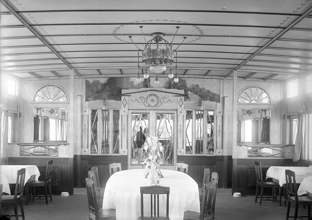 Это фотография интерьера парохода "Графиня" (с 1930 года "Иосиф Сталин"), который погиб в 1942 году эвакуируя мирных жителей из Сталинграда. Фотография сделана в 1909 году в Сормово